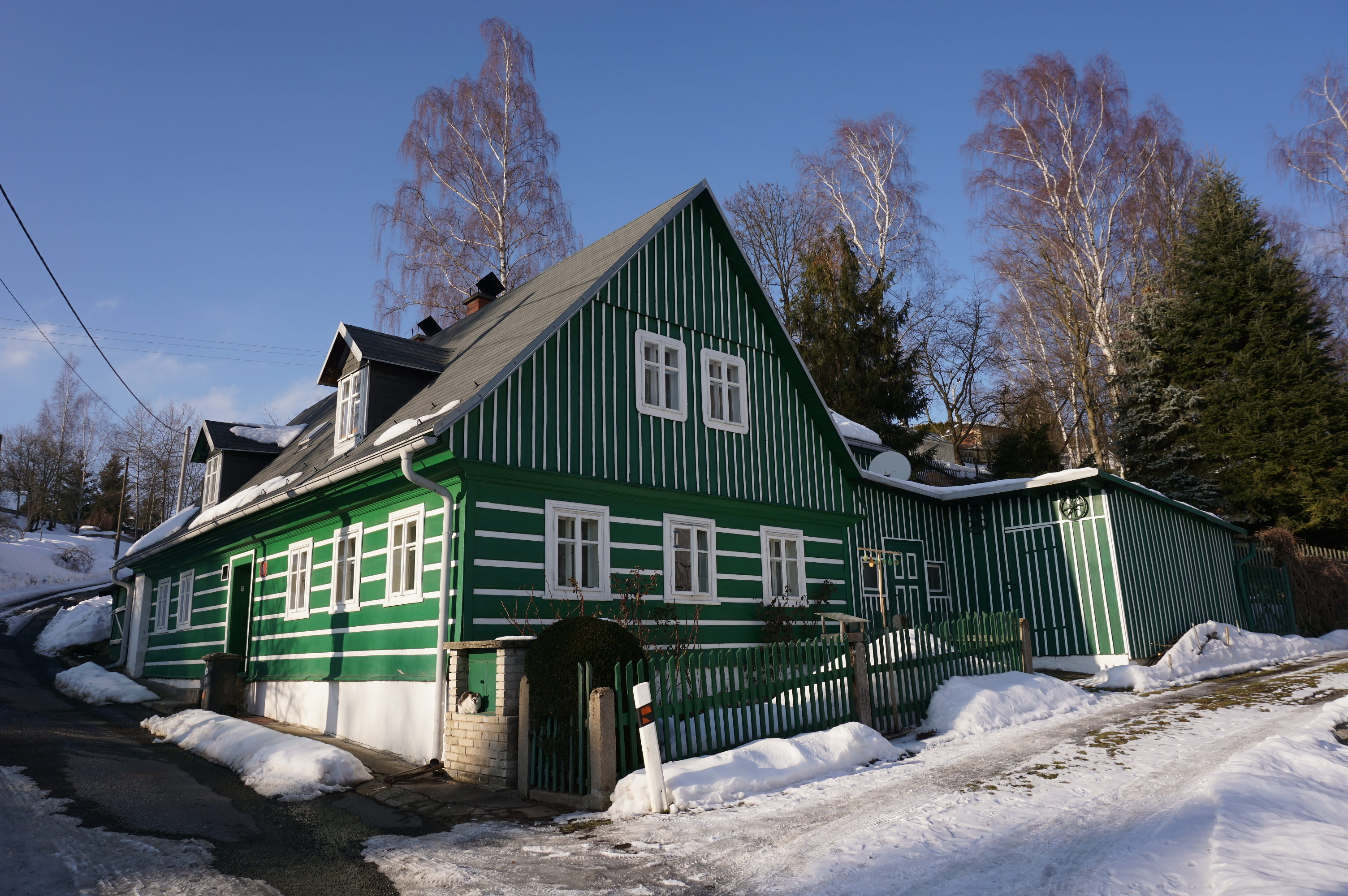 Nový Harcov (Liberec XVI) - čp. 83 v Kadlické ulici